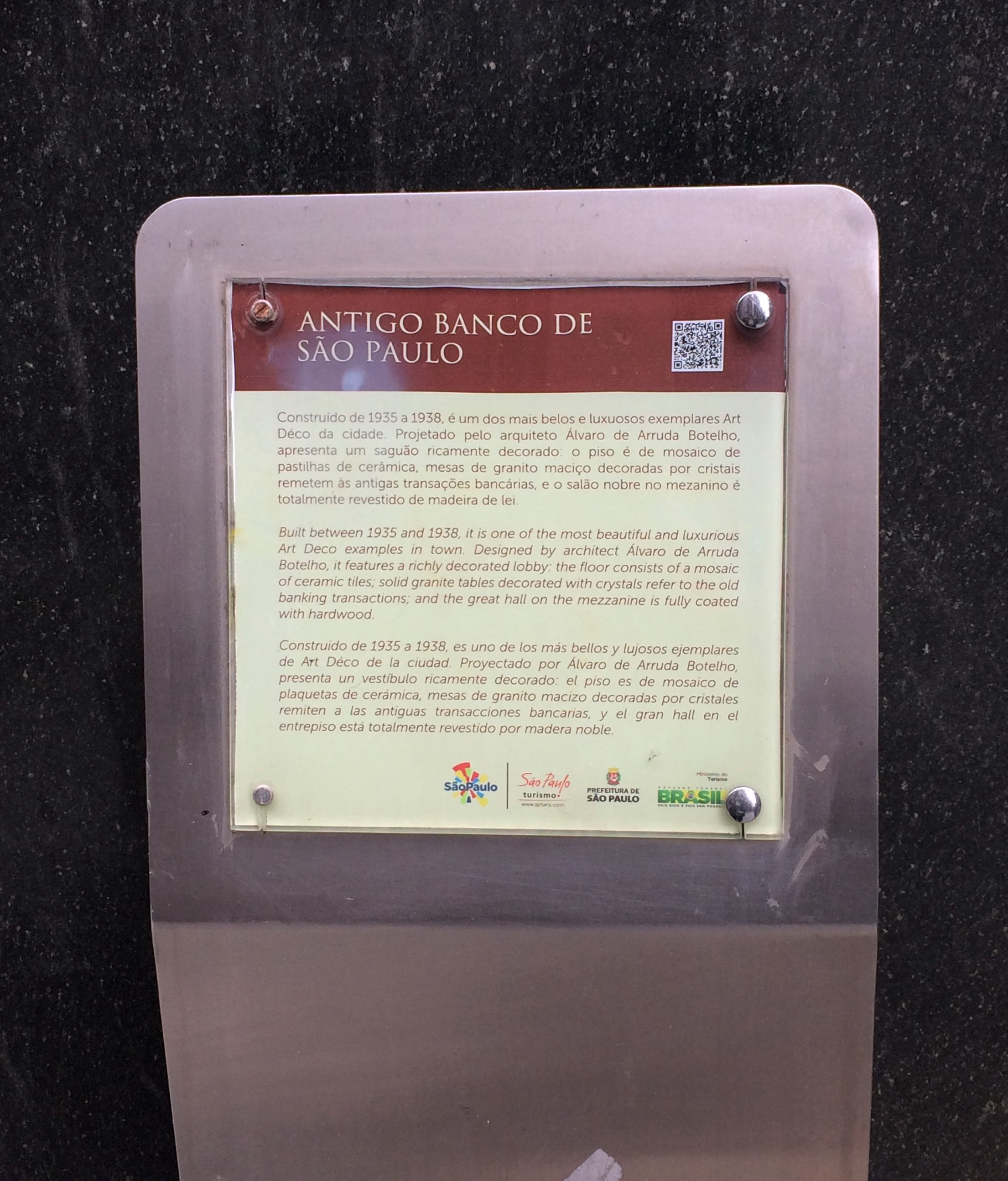 Placa na fachada do edifício que conta sua história, ano em que foi construído e o que já abrigou